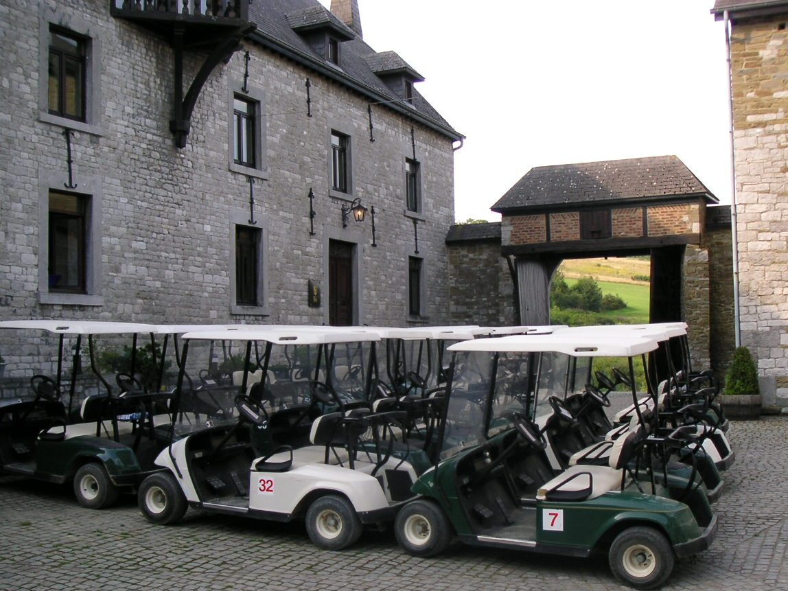 Méan - La cour de la Ferme du Grand Scley - Five Nations Golf Club - Voiturettes